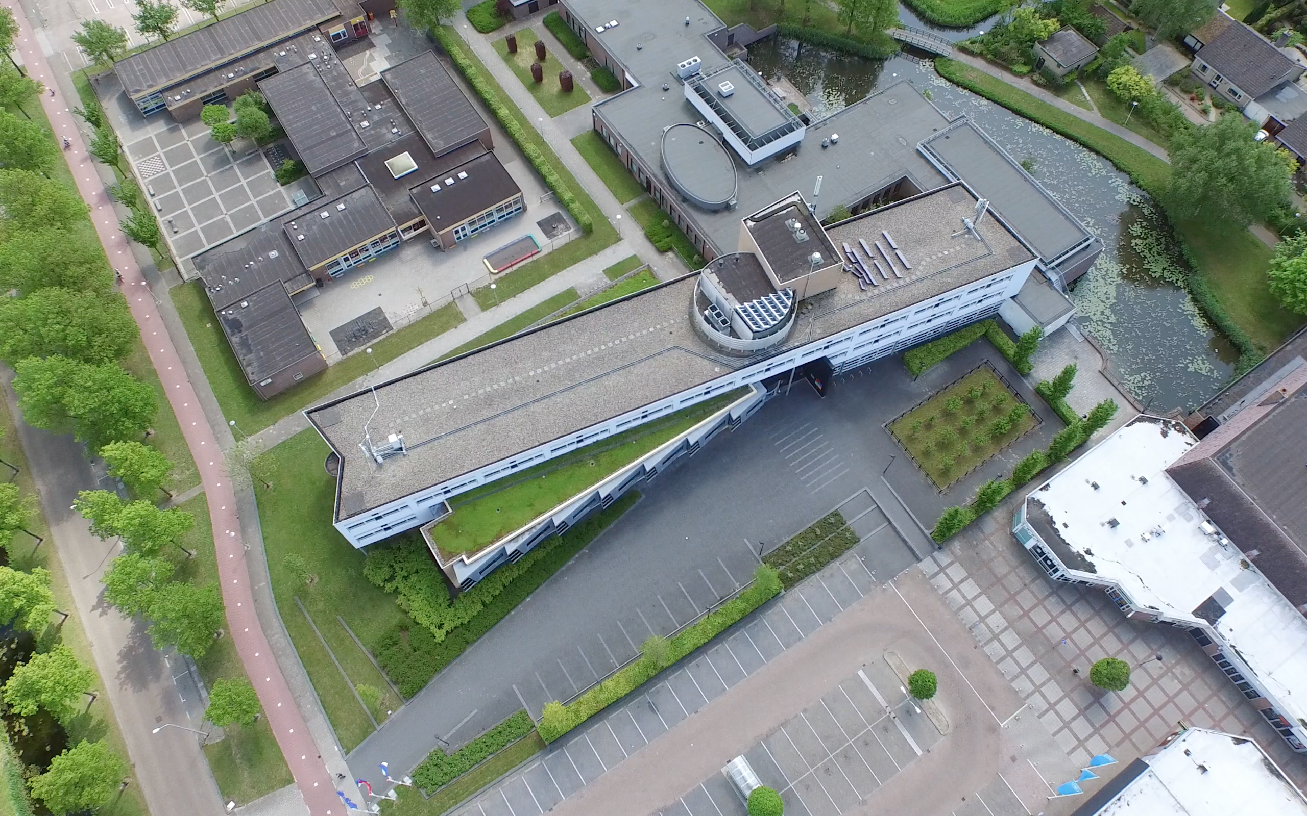 Gemeentehuis van Oud-Beijerland